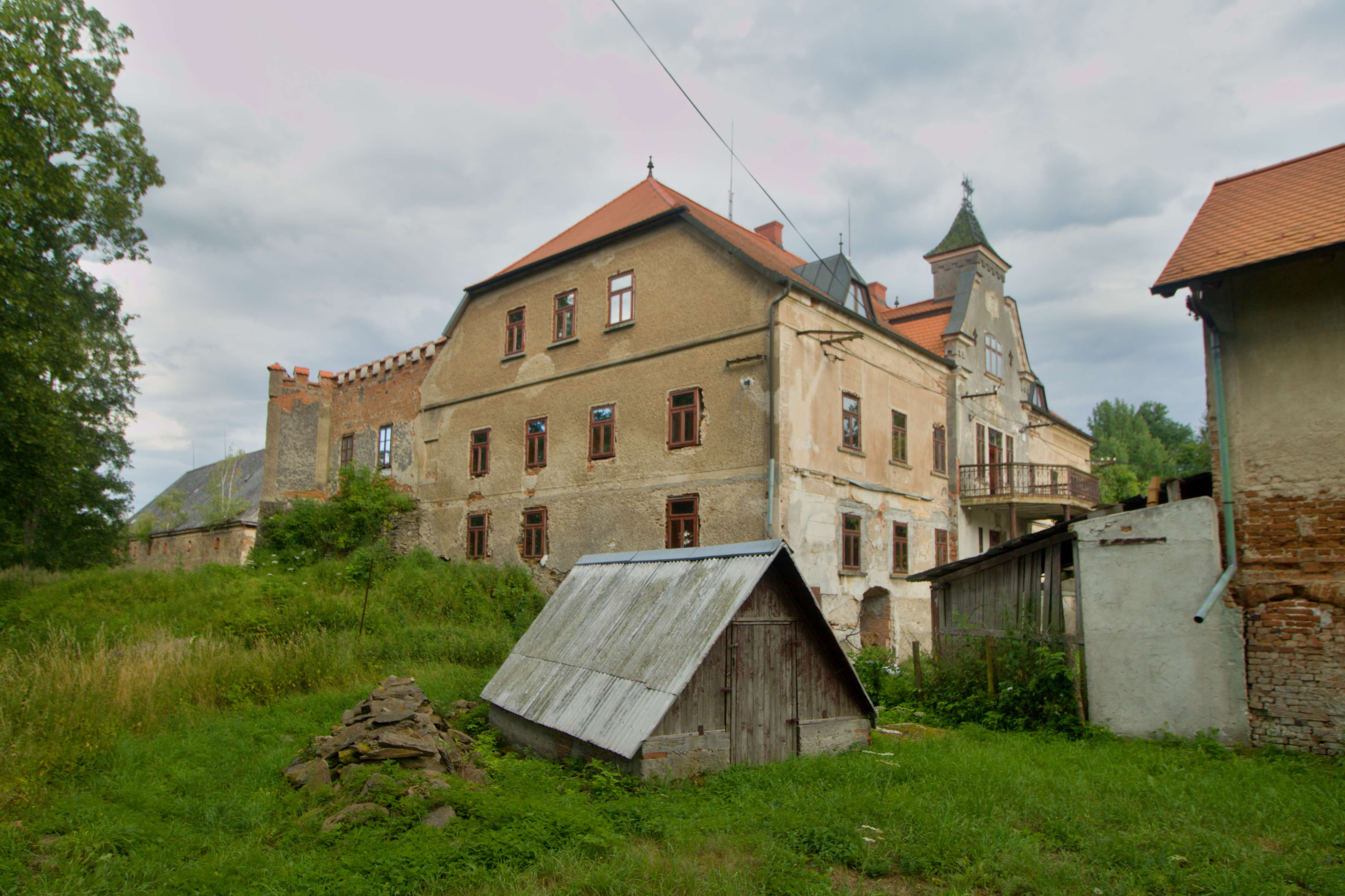 Bochov-Údrč